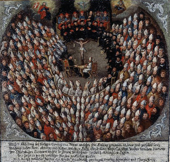 Konzil von Trient, Kopie nach einer Vorlage von 1563. Öl auf Leinwand. Um 1770. 74.5 cm x 76 cm Schweizerisches Landesmuseum, Zürich